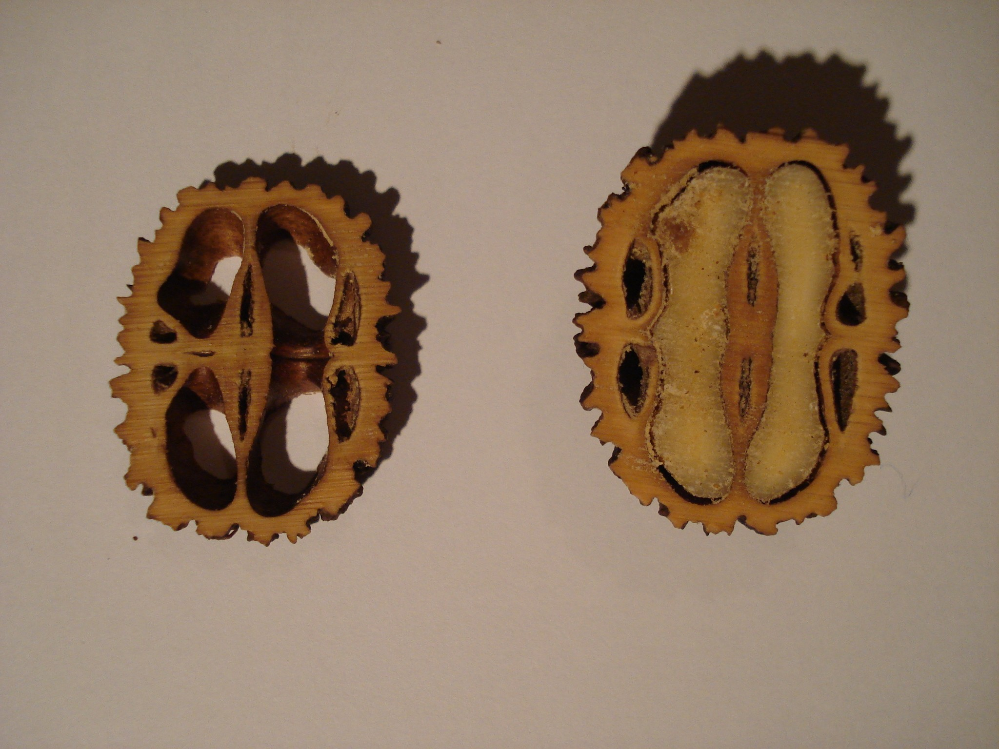 Schwarznuss : Schale mit Nusskern, Querschnitte